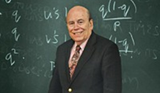 פרופסור למדעי המחשב מיכאל רבין